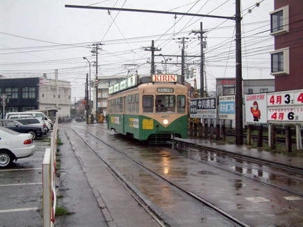 Tram de la ville de Toyama au terminus de Toyama minami ekimae (Honshu - Japon) en 2004 par Eric Binamé.